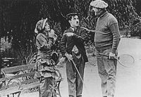 Escena de la película Mabel's Married Life (1914) de Charlie Chaplin